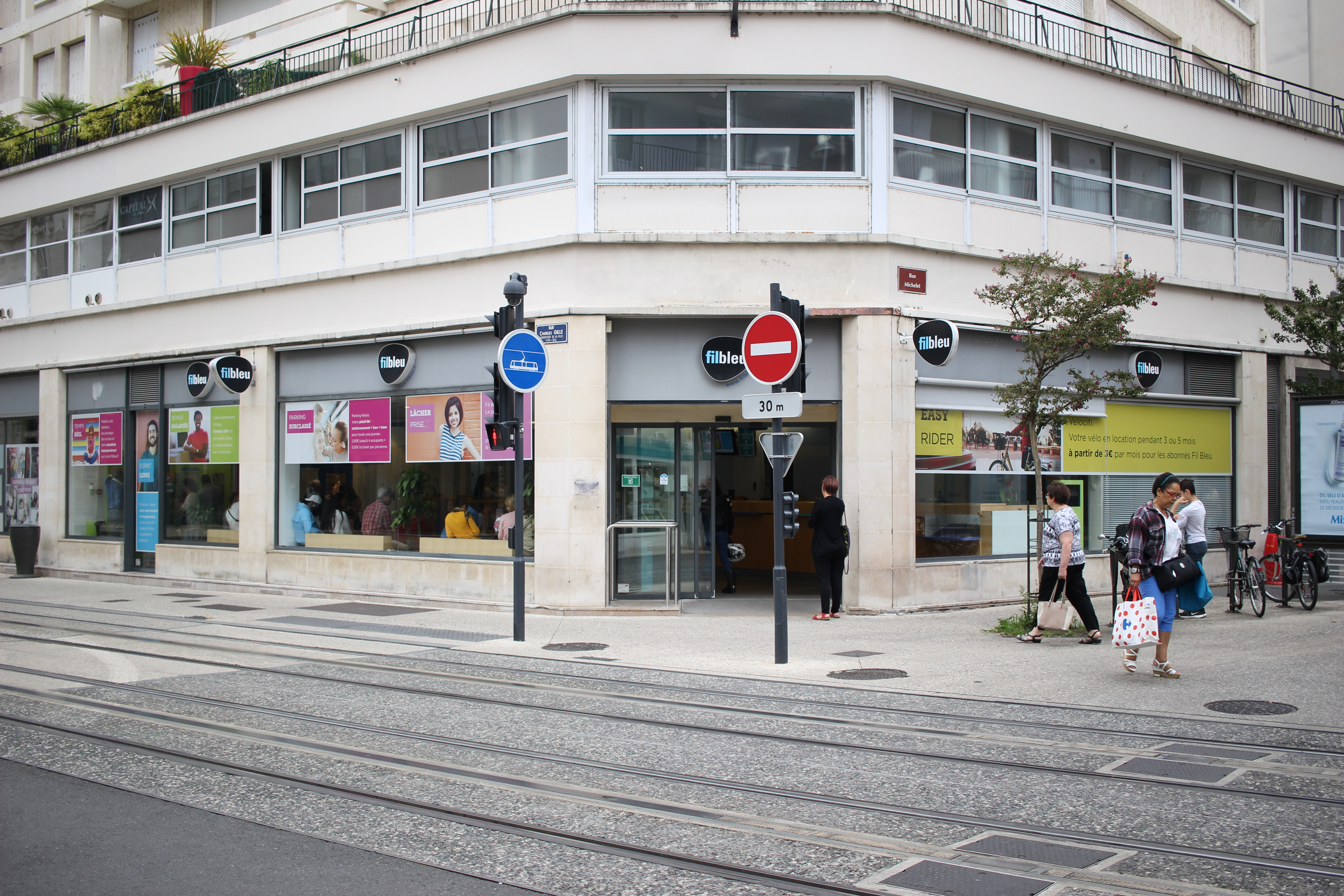 L'agence commerciale du transporteur public Fil Bleu, à Tours.